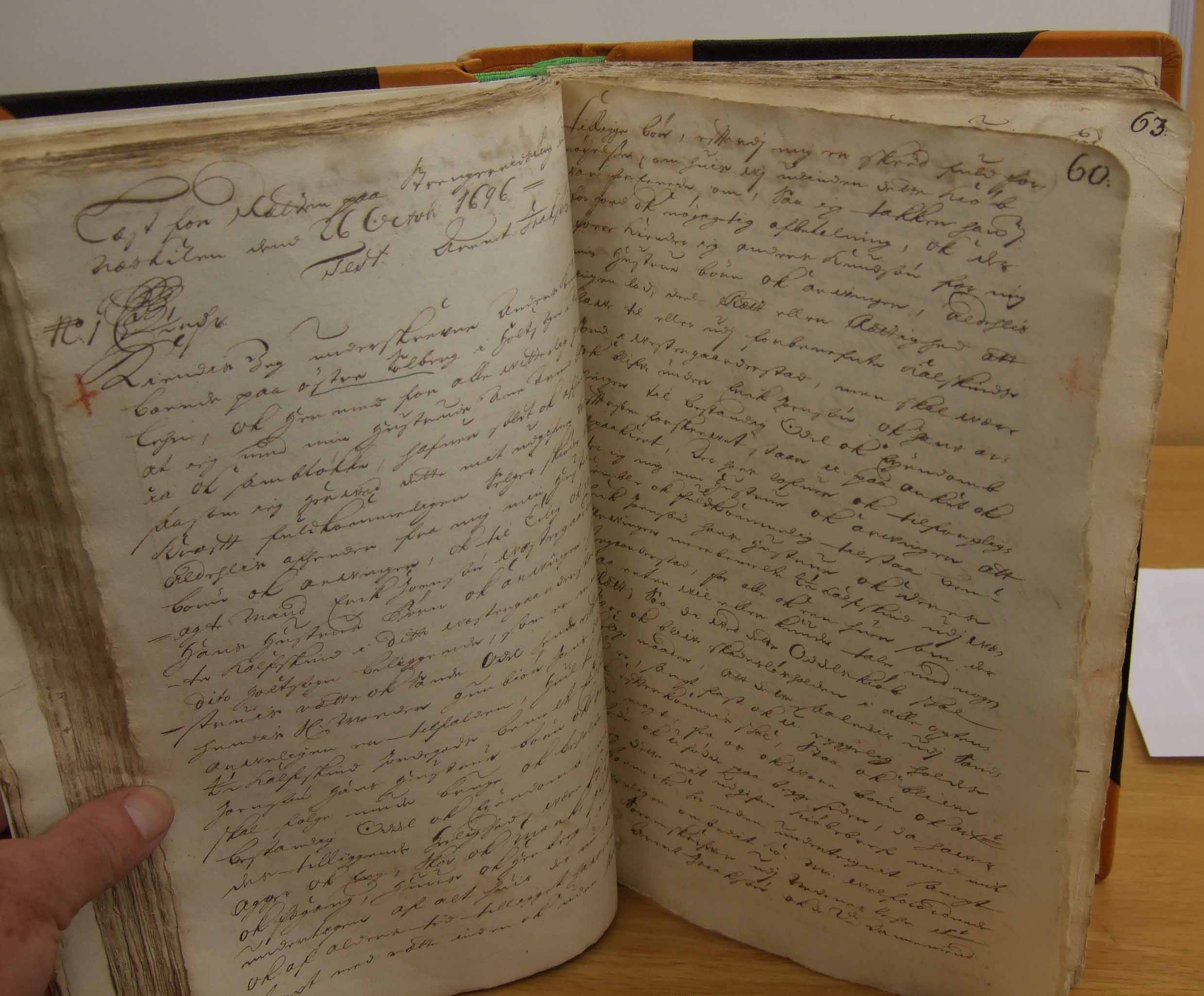 "Pantebok" No 1, Nedenes sorenskriverembede 1696.